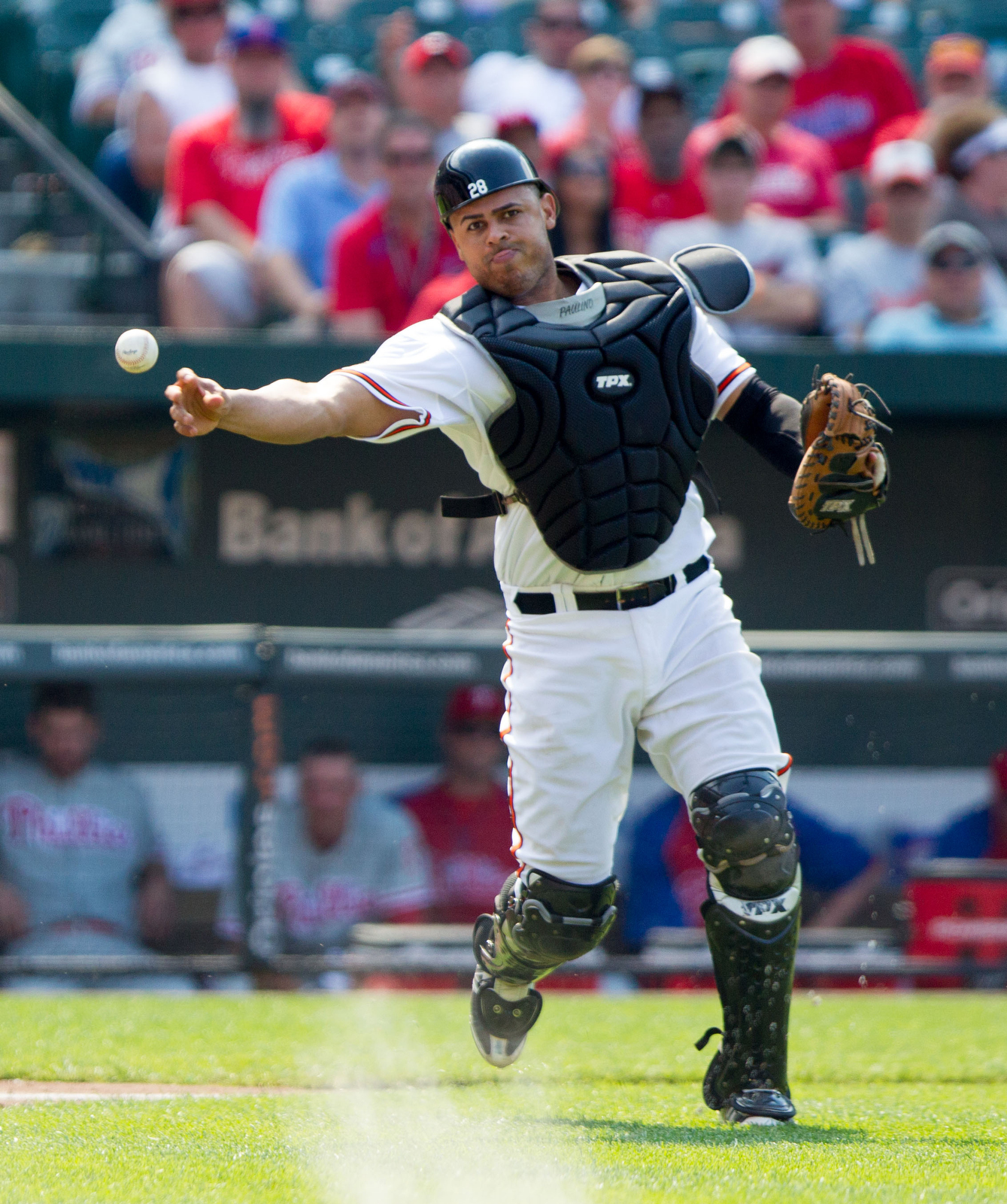 Ronny Paulino